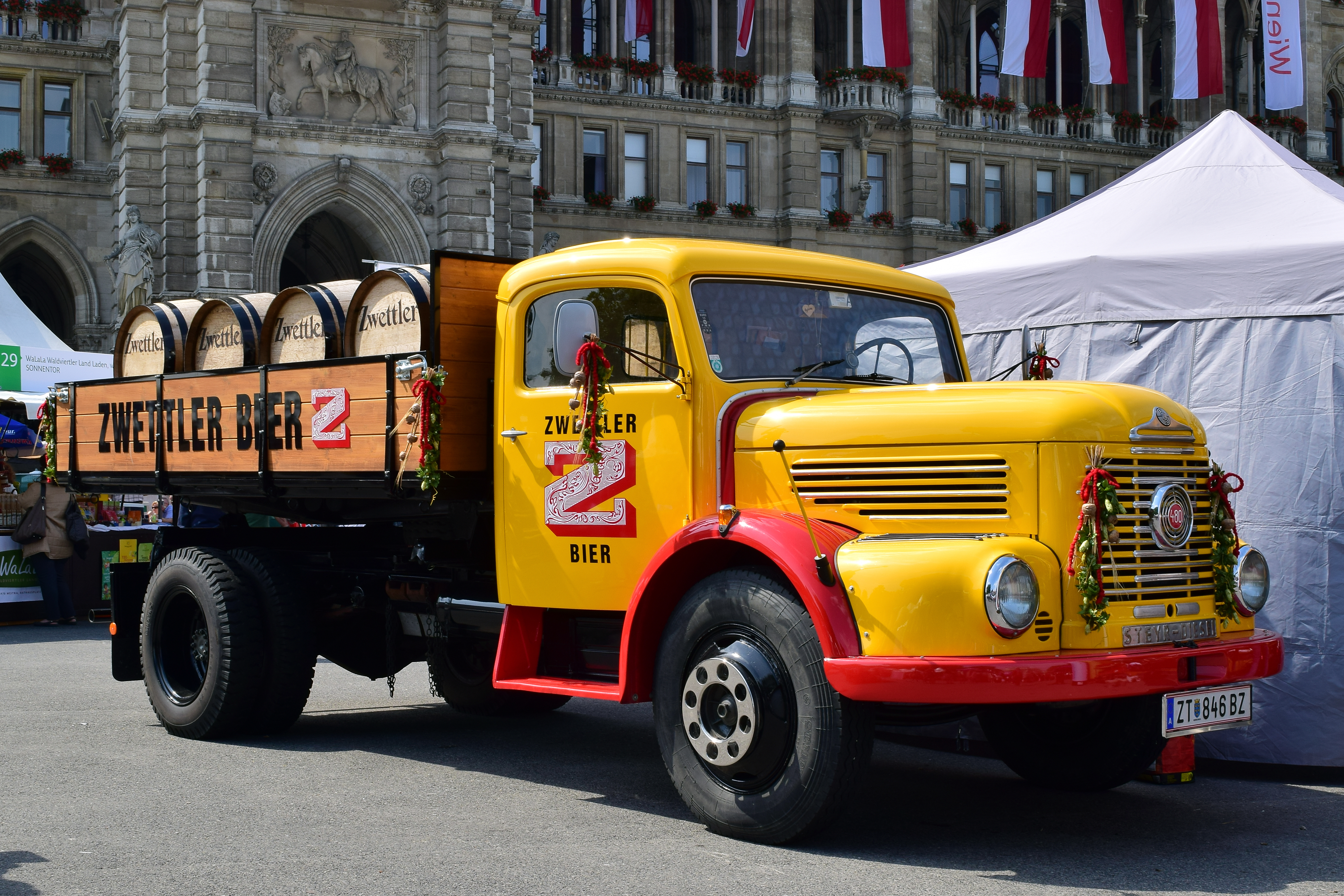 Zwettler Bierwagen (Steyr 480) bei waldviertelpur 2018 am Wiener Rathausplatz